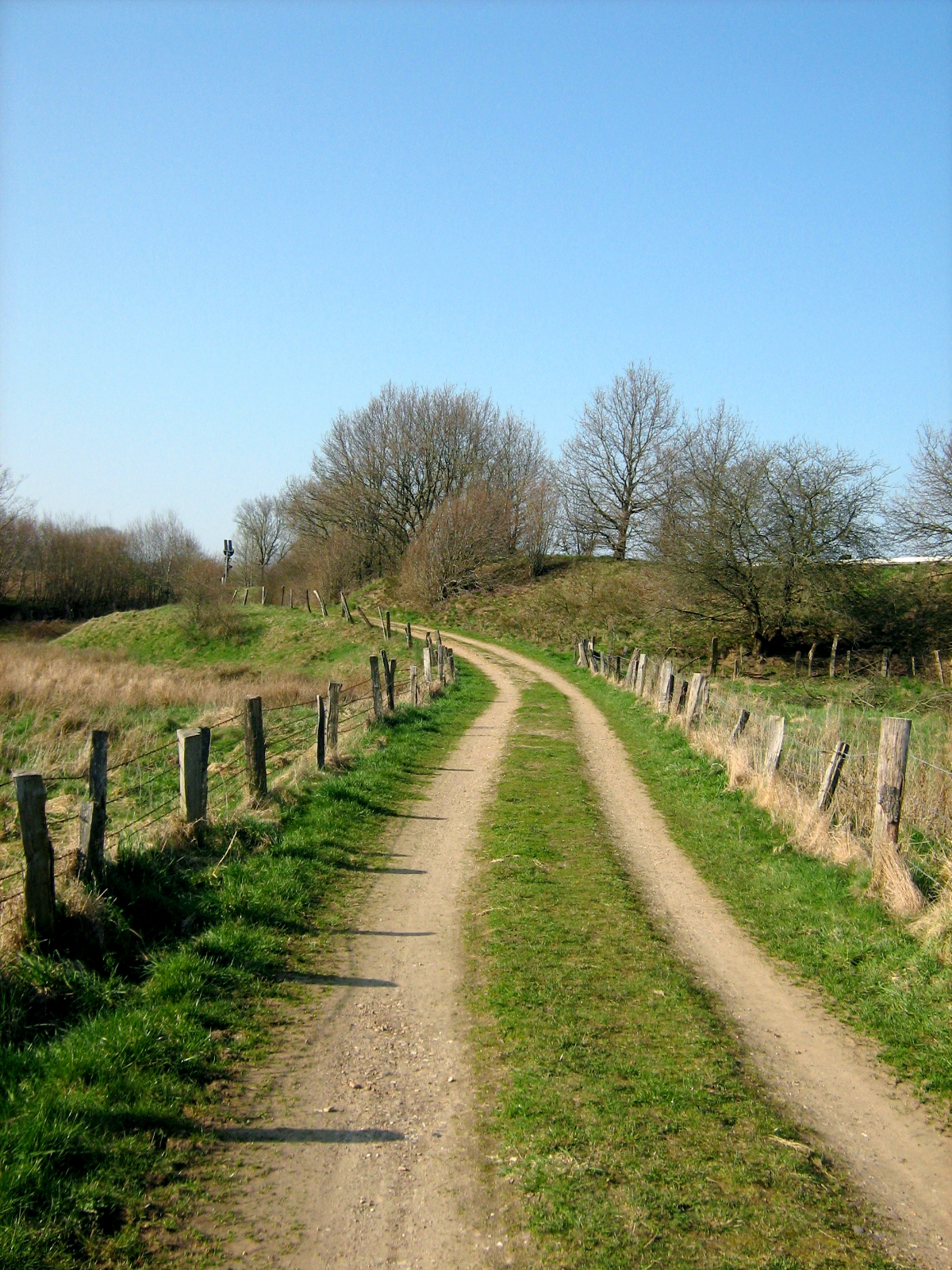 Weg im Naturschutzgebiet Os bei Süderbrarup, Blick in Richtung Norden, Fläche westlich der durchs NSG führenden Bahnstrecke